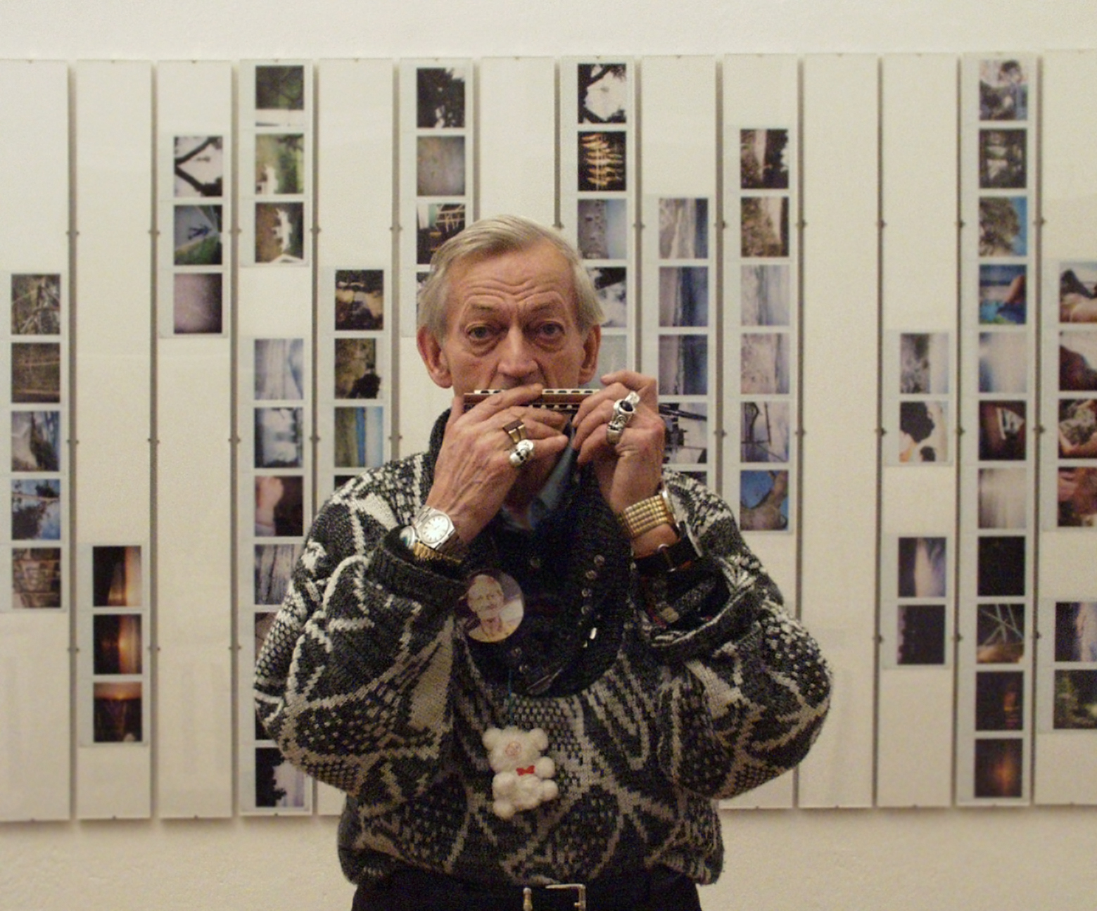 Kurt Wanski war während der 1990er Jahre ein häufiger Gast bei den Ausstellungseröffnungen im Brecht-Haus in Berlin-Weißensee. Nach den "offiziellen" Reden brachte er auch eigene Ständchen und bot seine Zeichnungen zum Verkauf an. Foto: im Brecht-Haus Weißensee am 23.11.1999